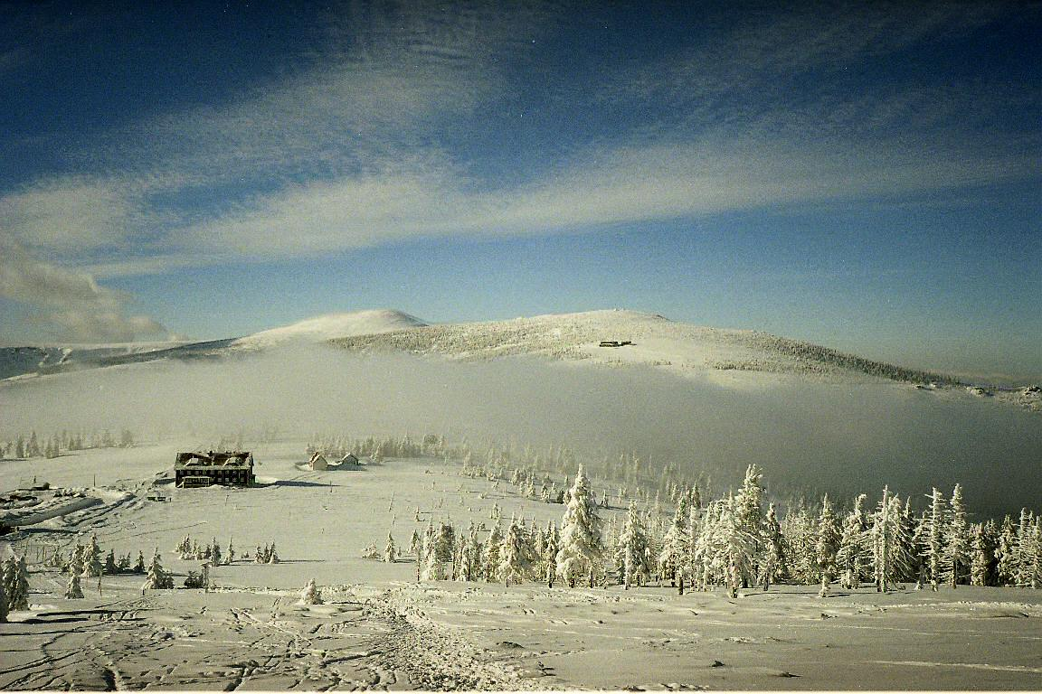 Przełęcz Karkonoska widok od strony Małego Szyszaka. Na pierwszym planie budynek straży granicznej. W oddali czeskie schronisko Petrova bouda. Styczeń 2005.